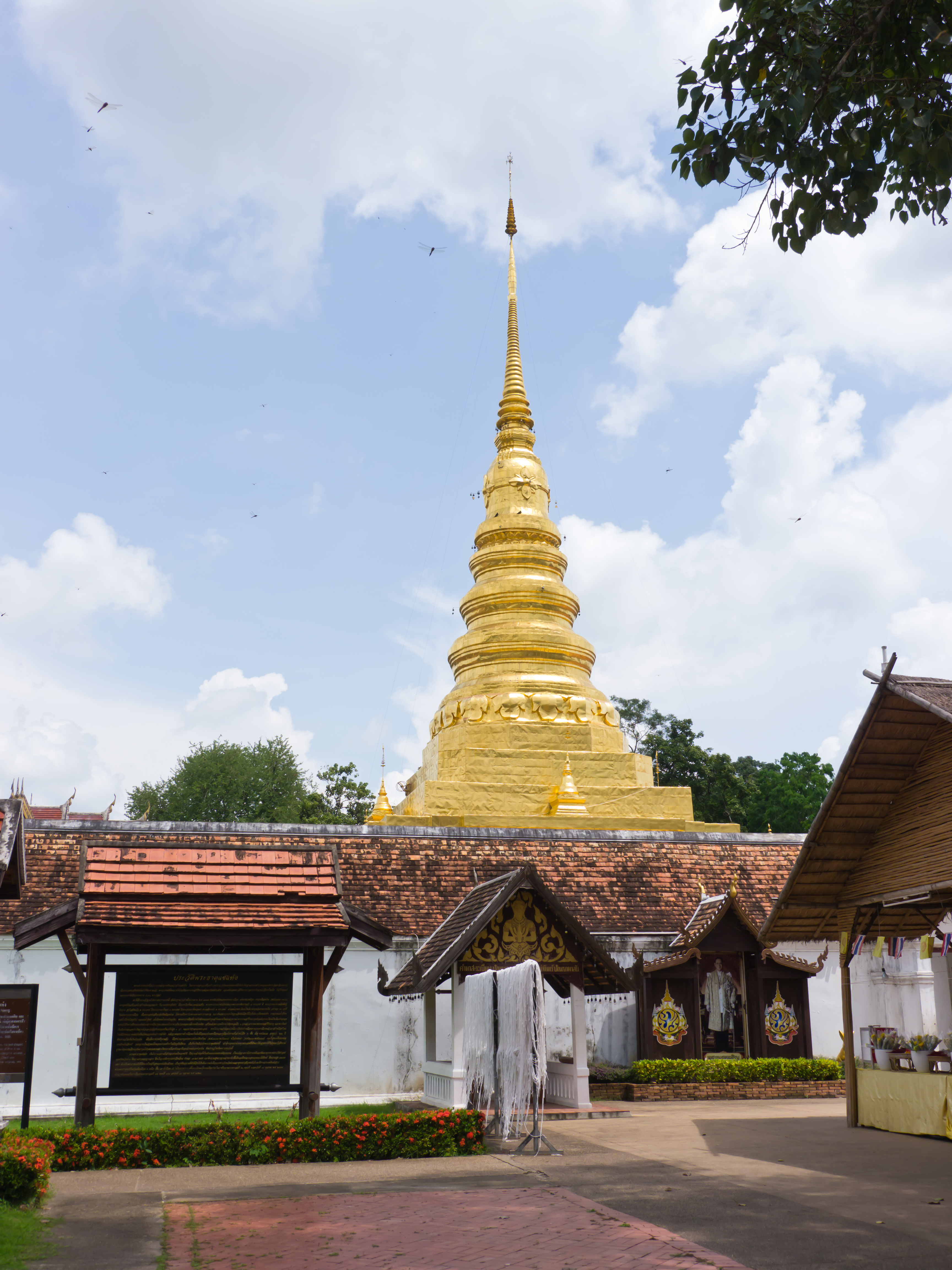 วัดพระธาตุแช่แห้ง